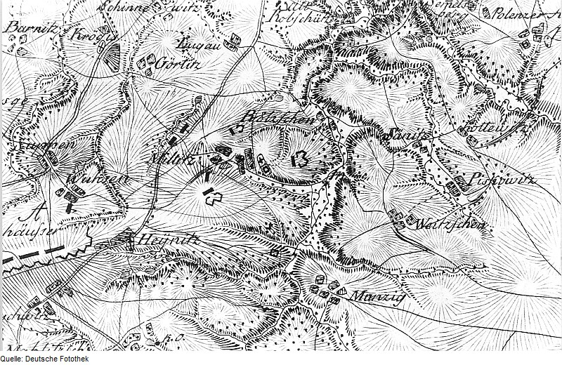 Original image description from the Deutsche Fotothek Triebischtal-Munzig. Ausschnitt aus: Situationskarten von den Kriegsschauplätzen des 7jährigen Krieges, Bl. ?, 1805 (Sign.: VIII 57)